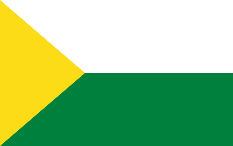 Bandera del Cantón Pablo XI